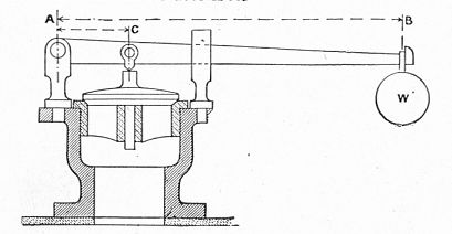 Fig. 168 Lever safety valve.